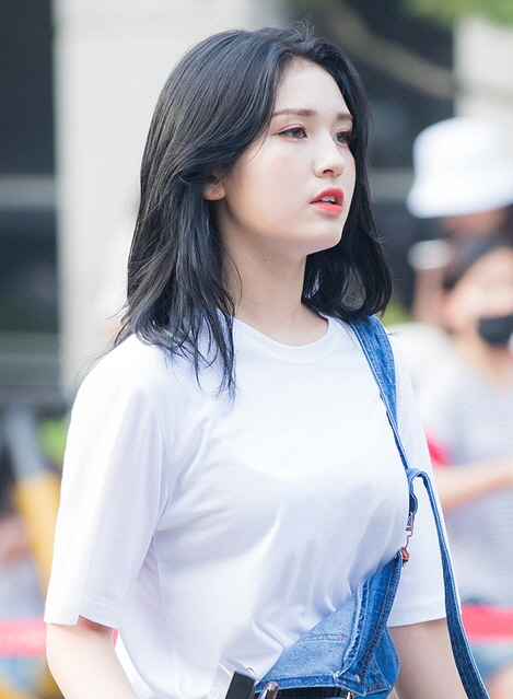 170714 뮤직뱅크 전소미